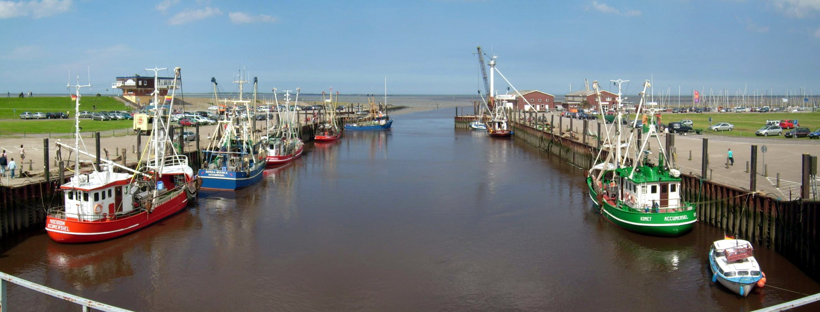 Fischerhafen in Dornumersiel